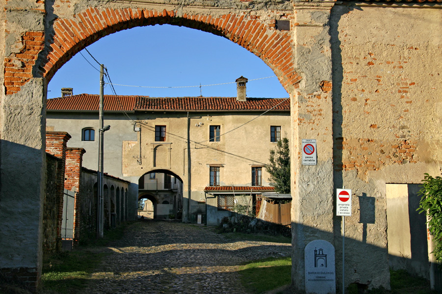 Ingresso meridionale della Badia di Dulzago